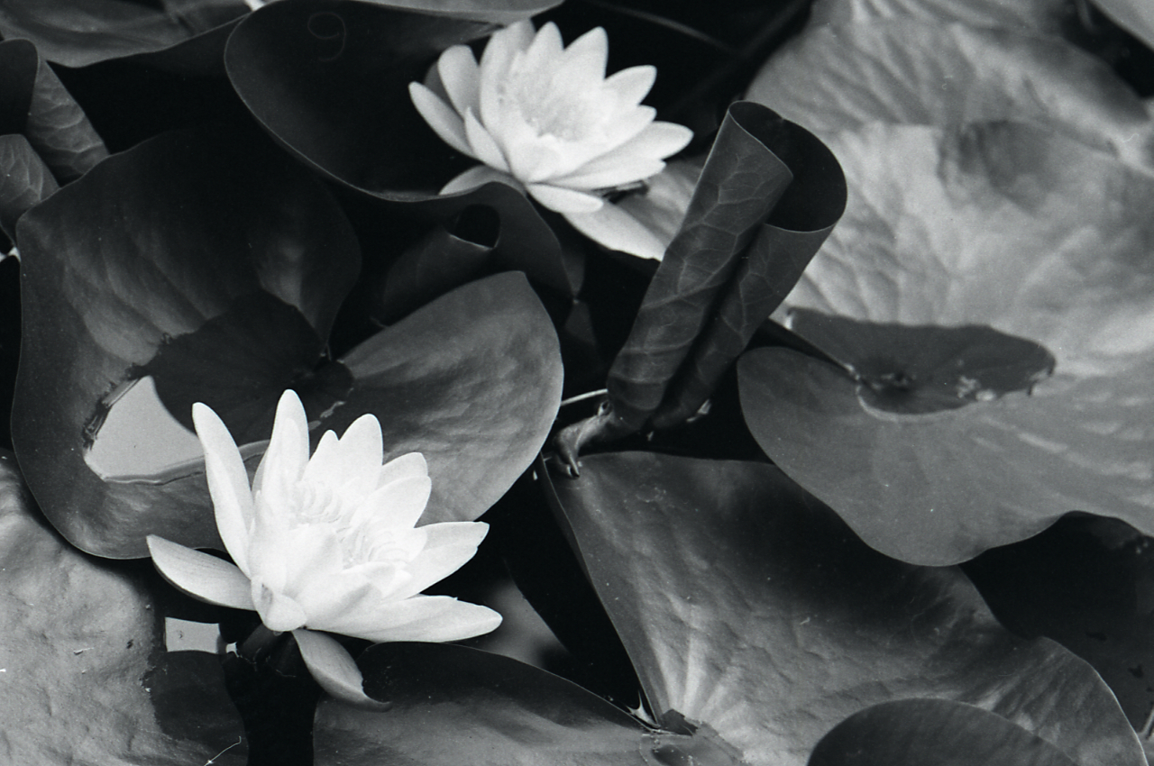 Padova: orto botanico, ninfee. Servizio fotografico : Padova, 1967 / Paolo Monti. - Strisce: 7, Fotogrammi complessivi: 37 : Negativo b/n, gelatina bromuro d'argento/ pellicola ; 35 mm. - ((I fotogrammi hanno una doppia numerazione. . - Sul portanegativi: Leica M Adox 21. - Occasione: Pubblicazione: Diego VALERI (a cura di), Padova: i secoli, le ore, Bologna, Edizioni Alfa, 1967. - Agenda di Paolo Monti: Monti/ 3 aprile 1966 - 9 marzo 1971/ 12421-16823 (1966-1971), presso Archivio Paolo Monti. - Fonte